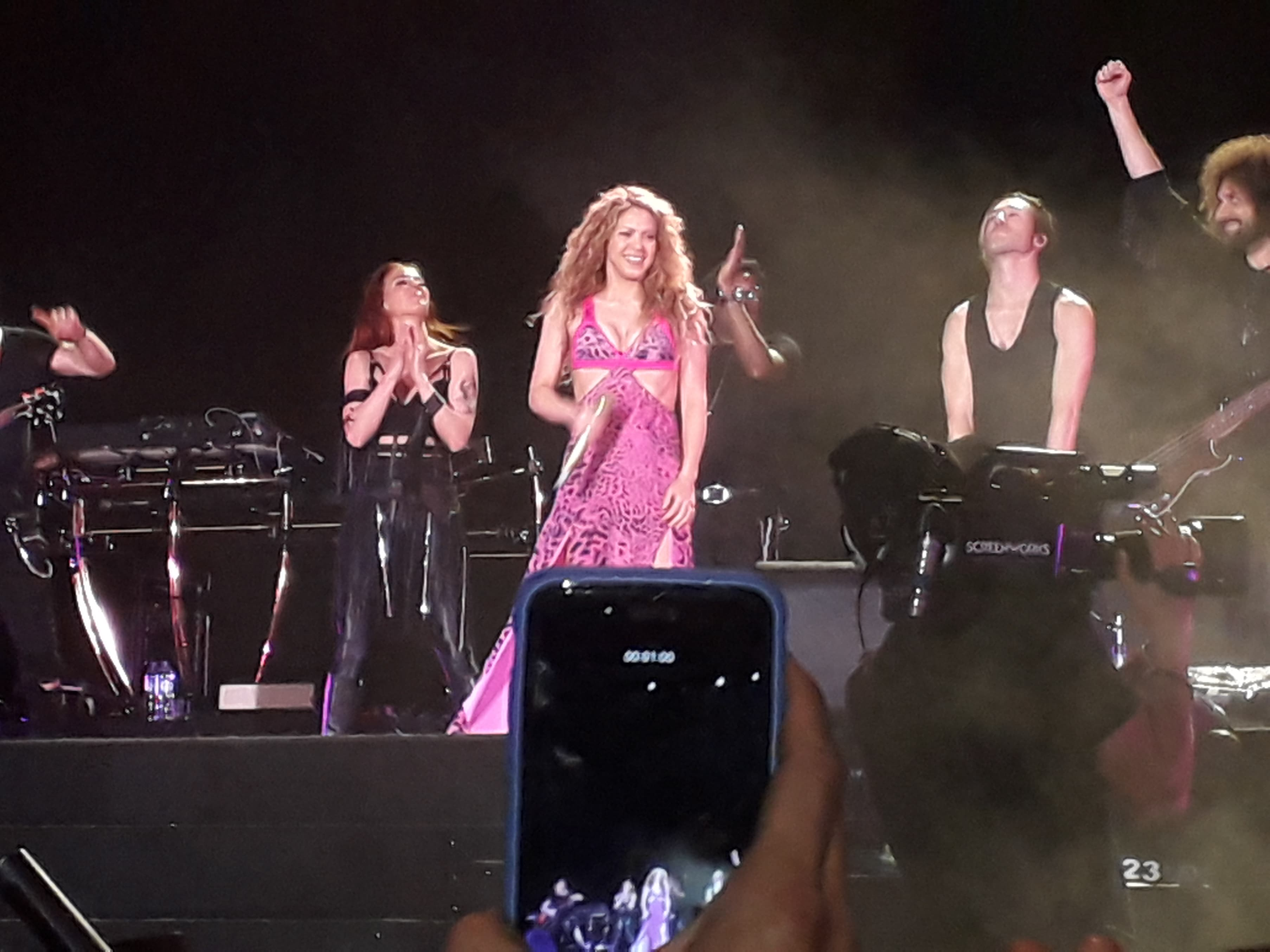 Shakira durante su gira: El dorado World Tour en Bogota Colombia